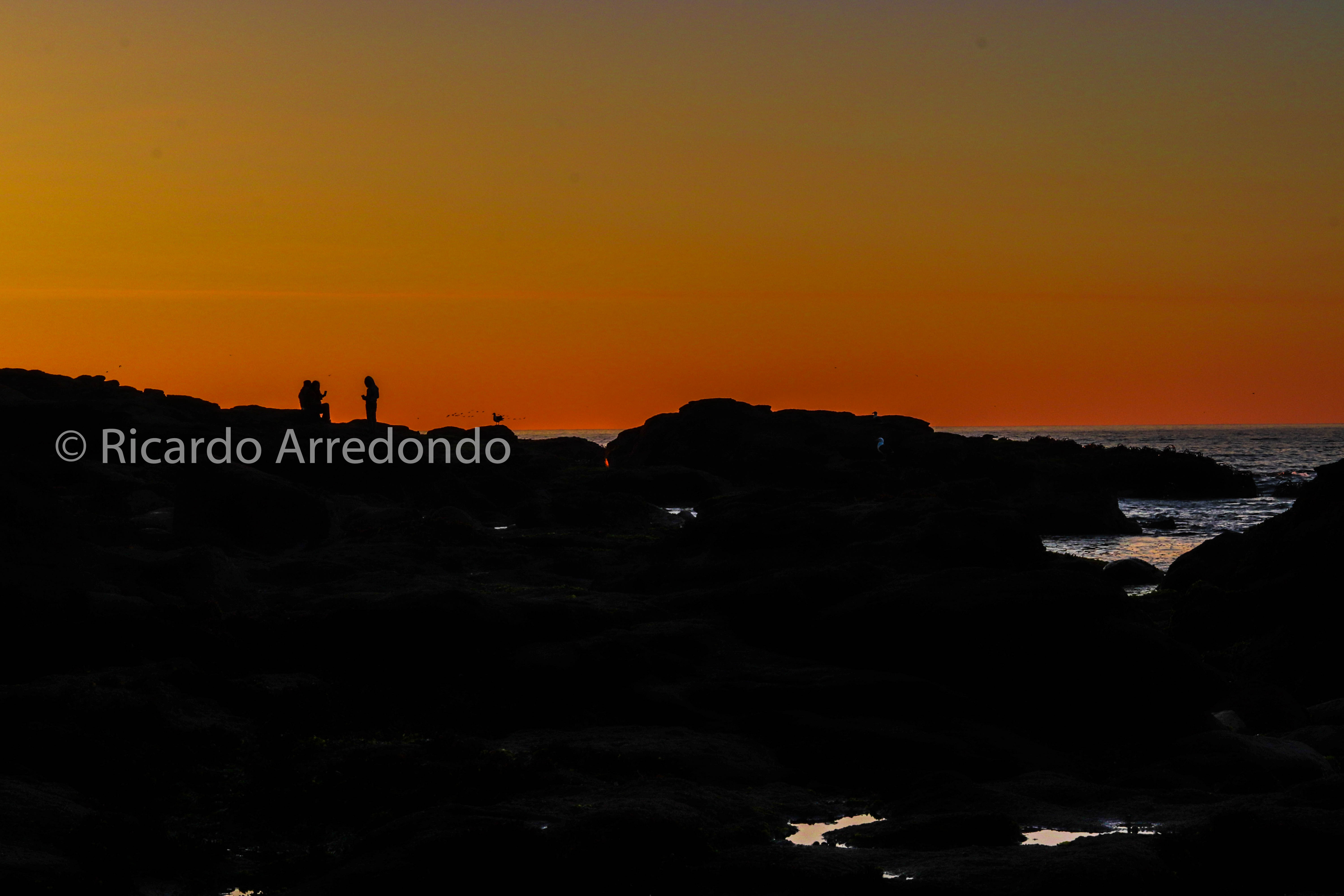 Atardecer, Caleta de Horcon